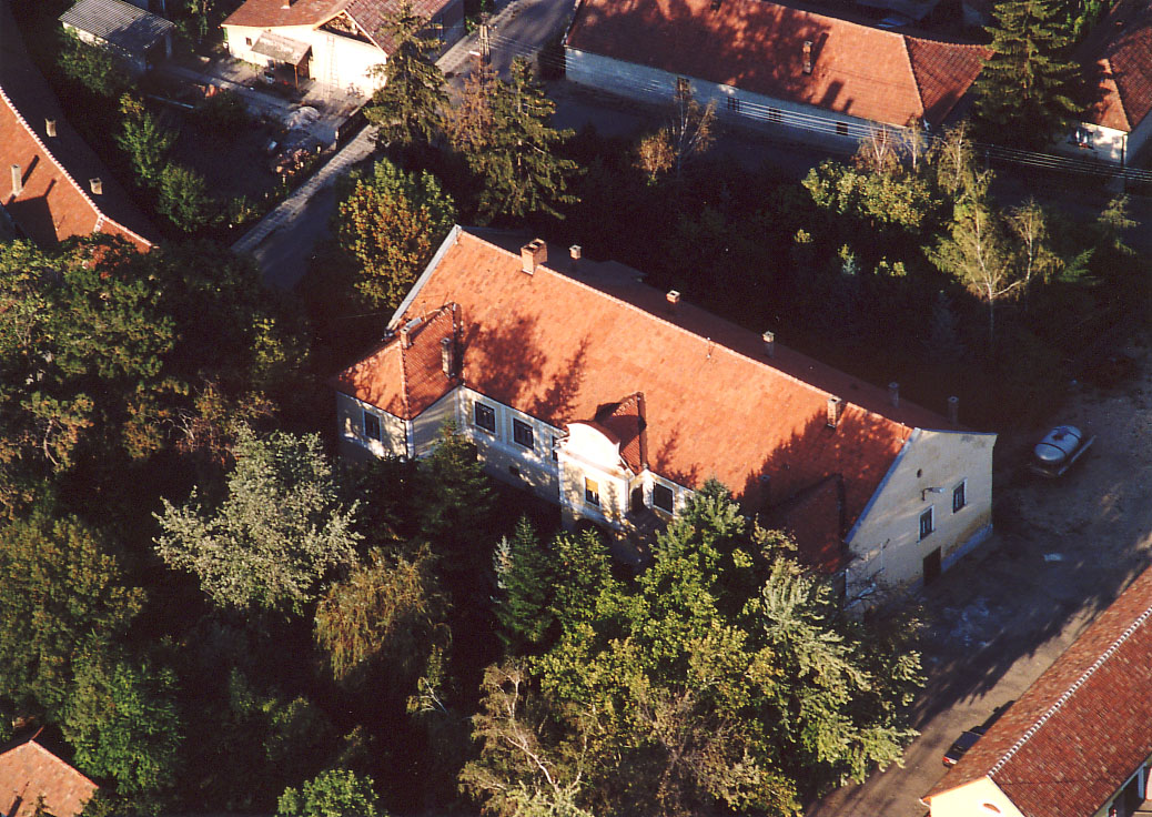 Palace - Tolcsva - Hungary - Europe (Dessewffy Mansion) Iroda, volt Dessewffy-kastély, kora barokk, 1659. Bővítve és átalakítva a 19-20. sz.-ban. azonosítója 3284 (törzsszám 1376). - Borsod-Abaúj-Zemplén m., Tolcsva, Szent Imre u. 4.